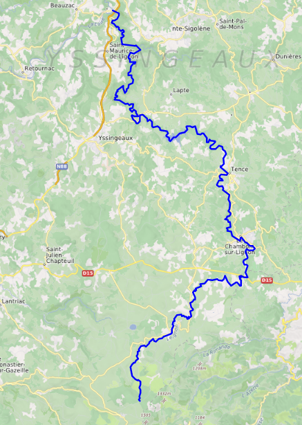 carte réalisée sur umap This map may be incomplete, and may contain errors. Don't rely solely on it for navigation.